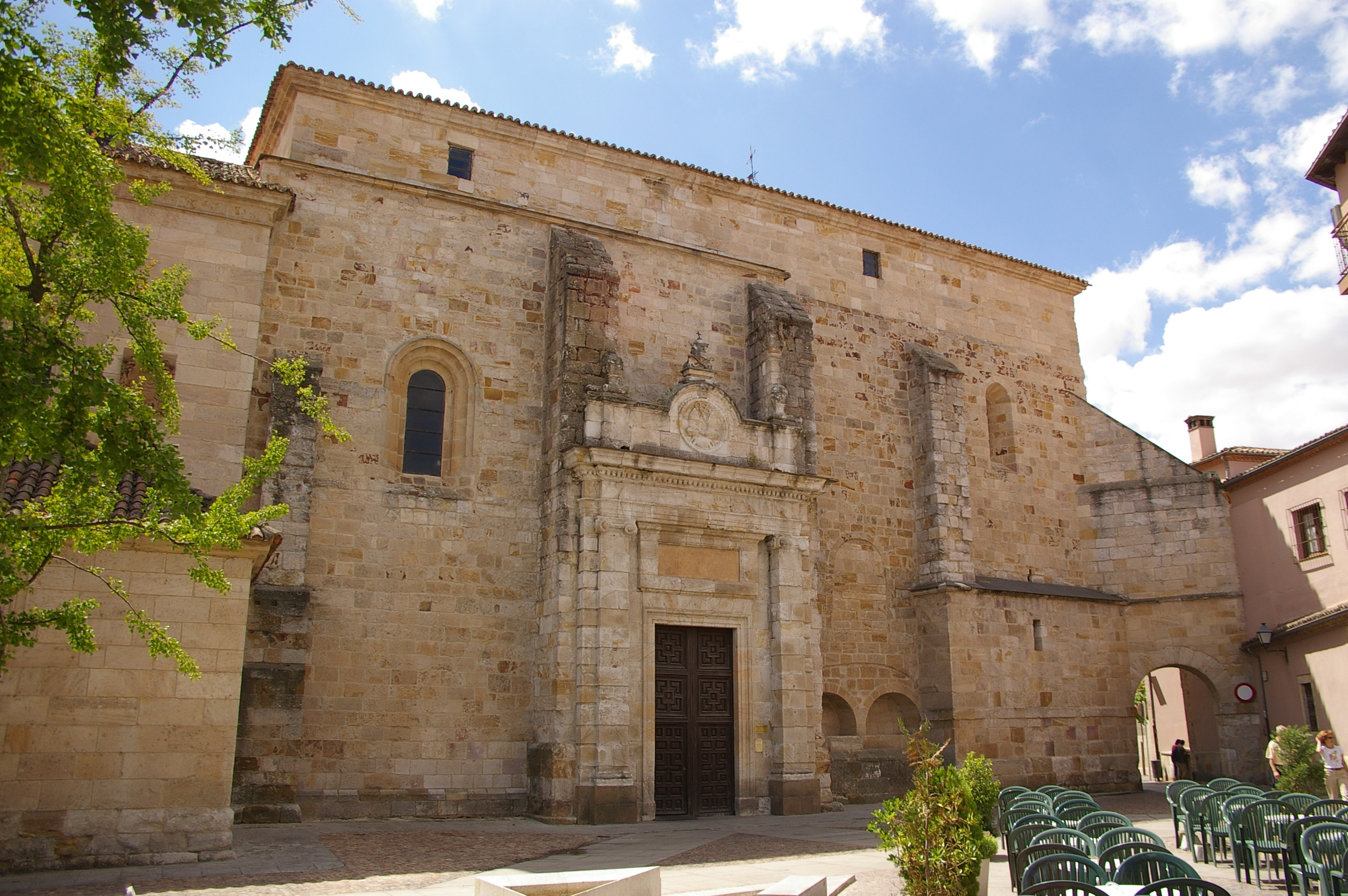 Iglesia de San Ildefonso. Siglos XII-XVIII.